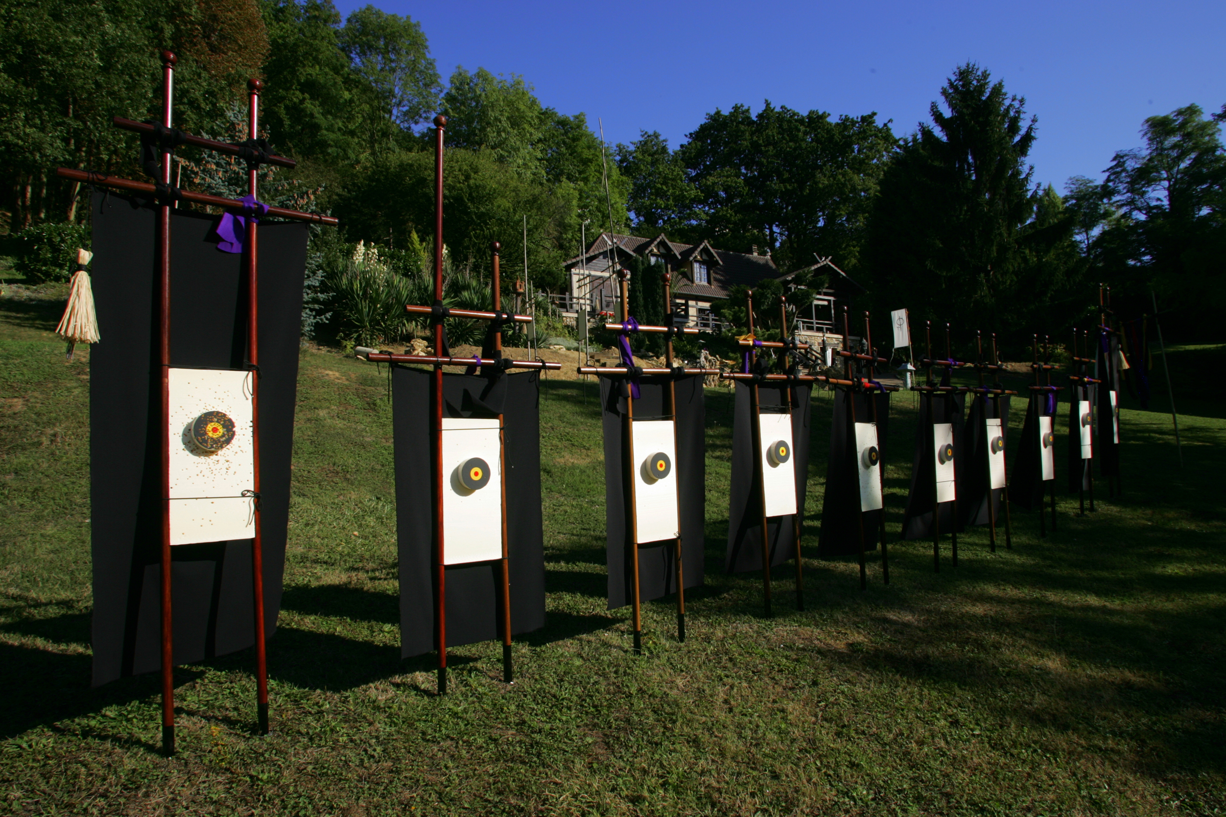 Aire de tir de l'école du souffle Sarbacana